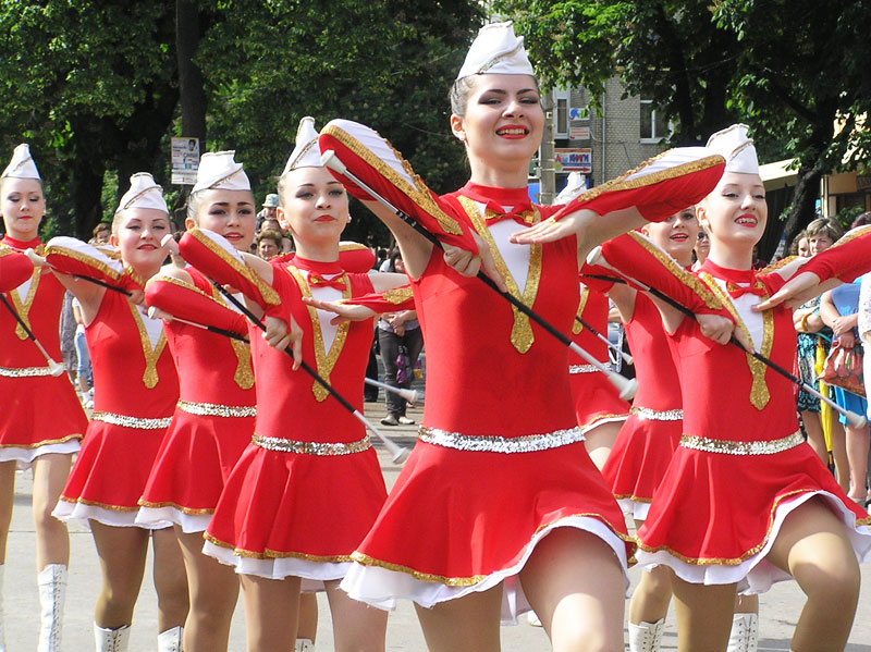 18.05.2013 Мажоретки "Альфа" святкують День Європи у Хмельницькому